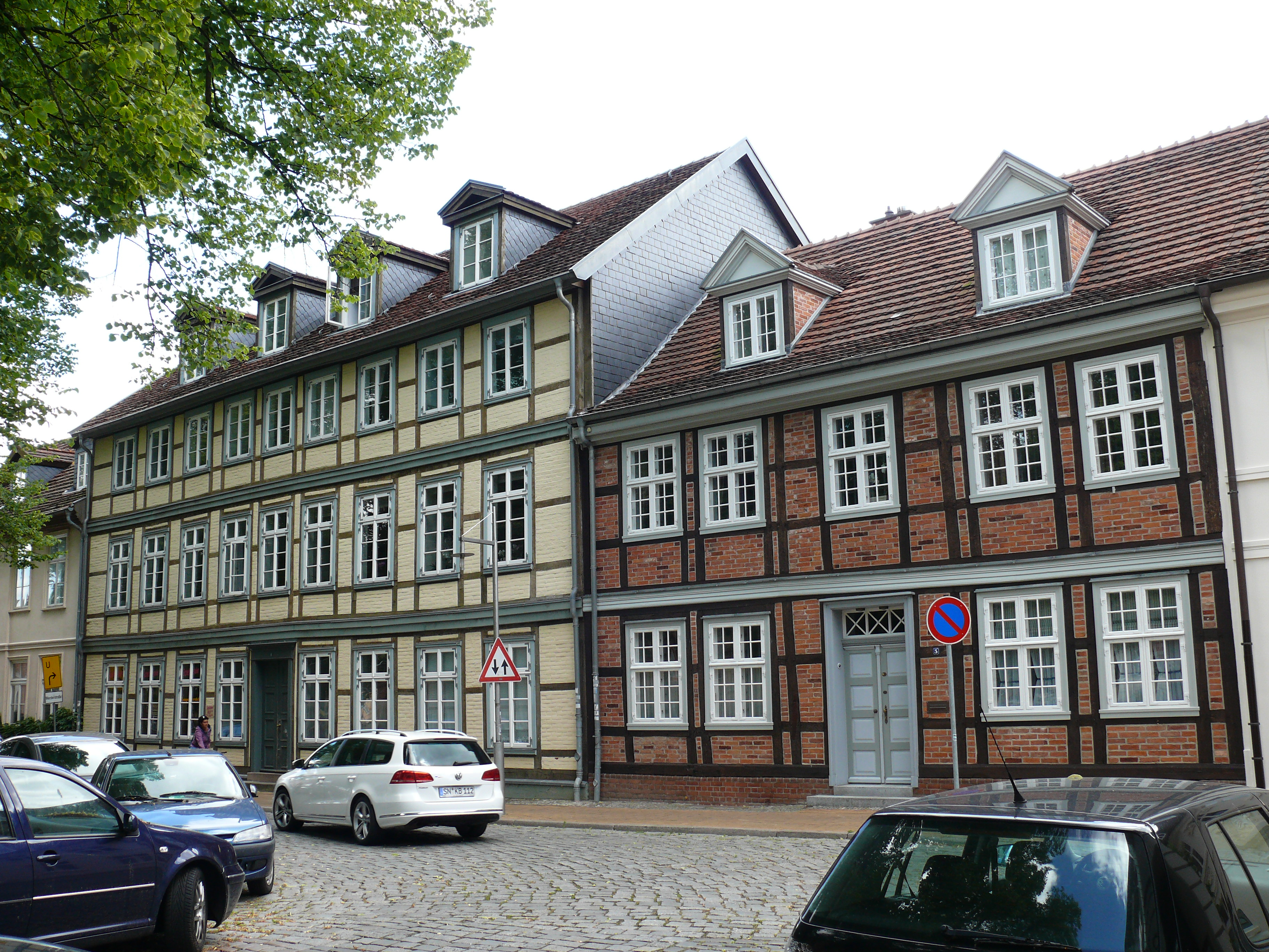 Die Gebäude "Lindenstraße 5 (rechts) + 6" in Schwerin.